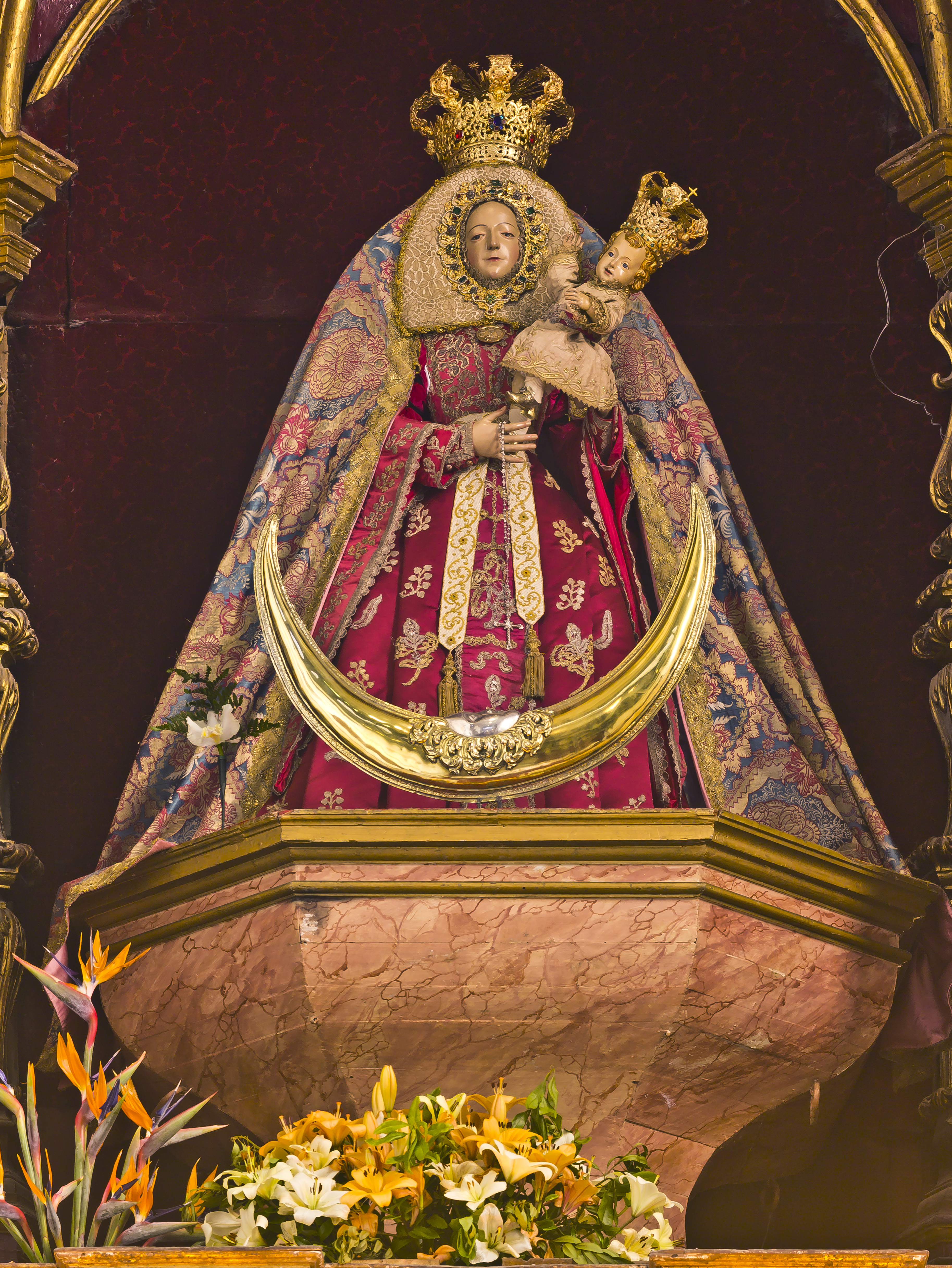 Virgen de los Remedios in der Kathedrale in La Laguna